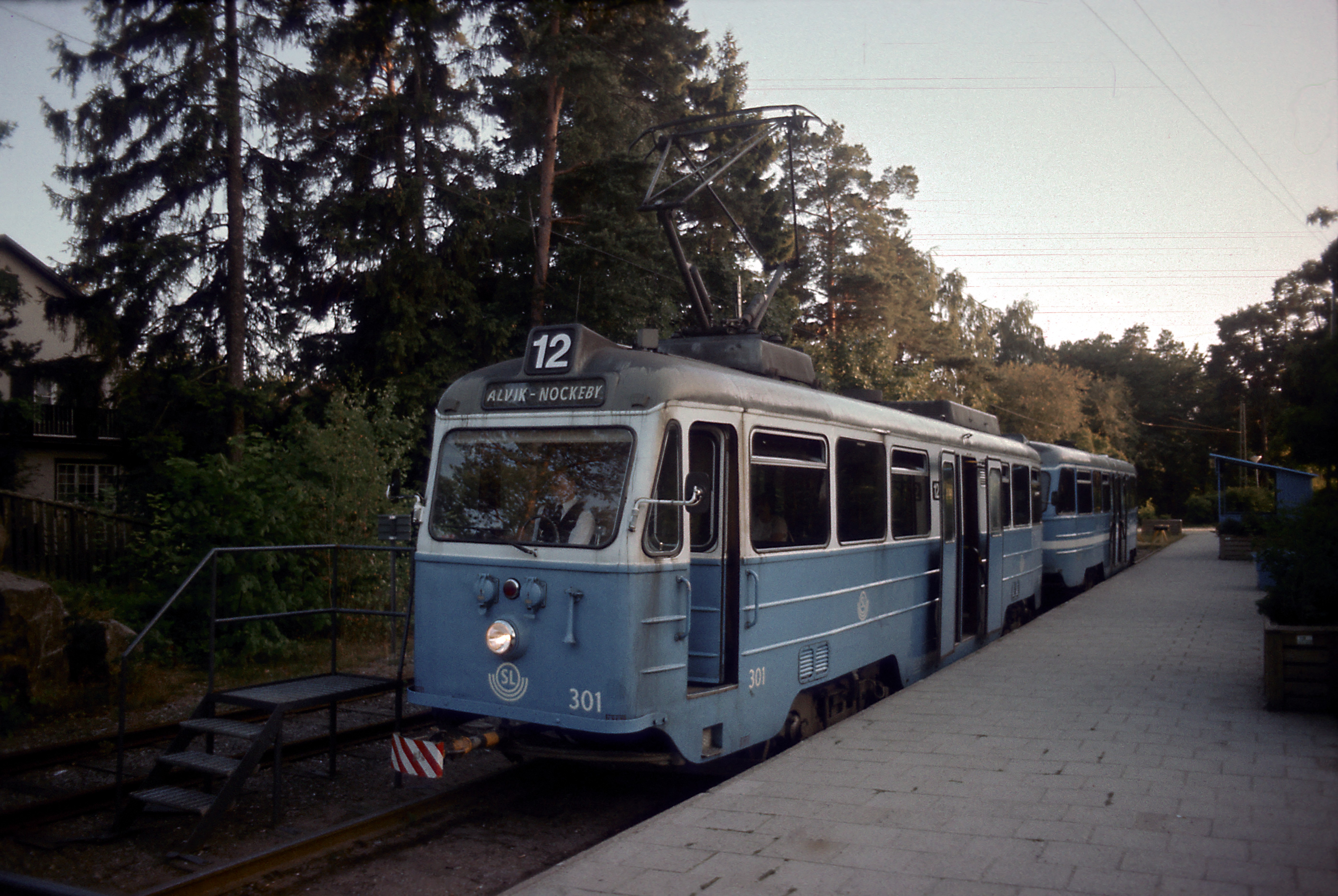 am Bahnsteig vor der Rückfahrt nach Alvik, noch im alten Anstrich